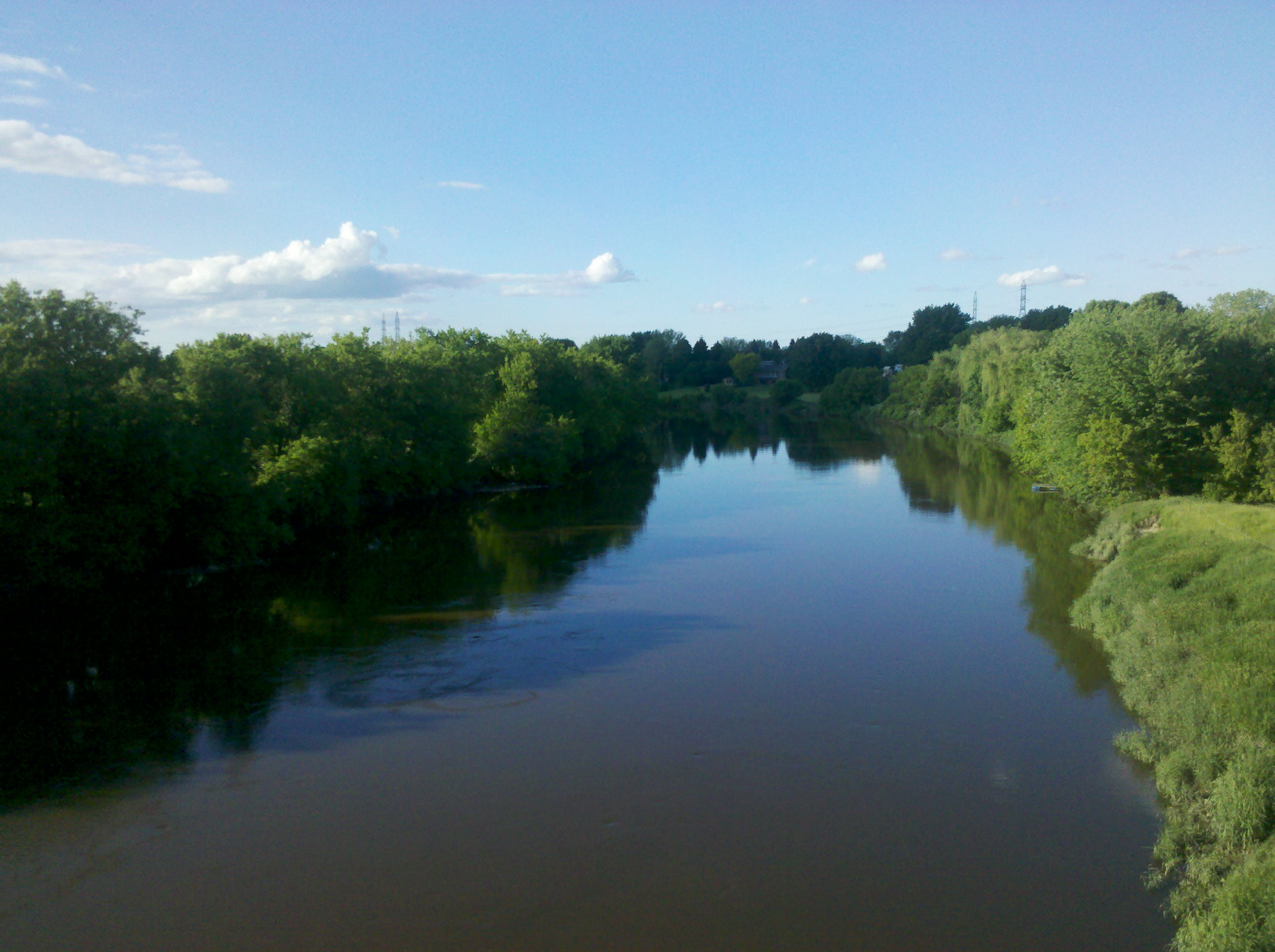 Rivière Yamaska à Saint-Césaire (Québec)